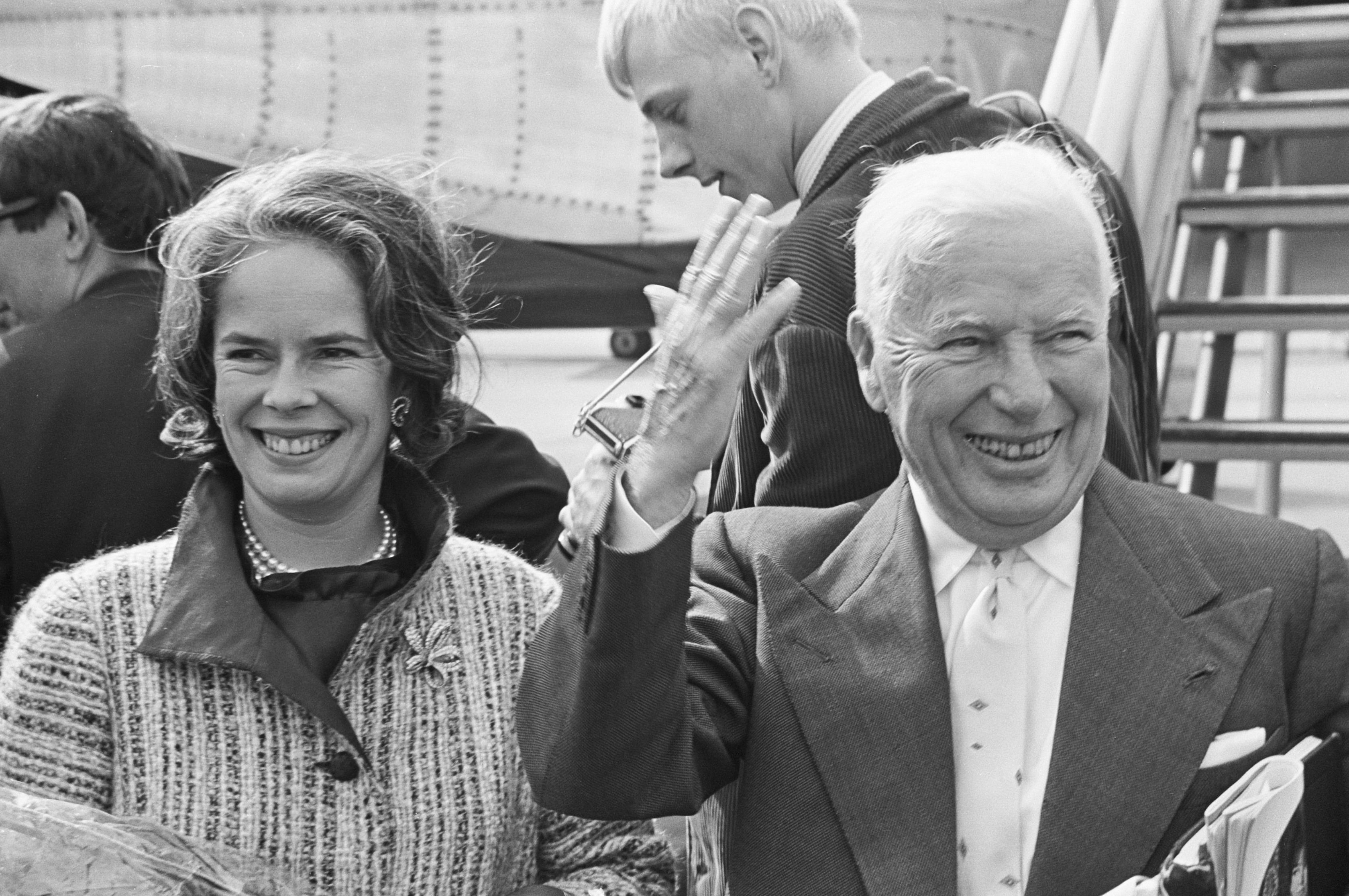 Aankomst van acteur Charlie Chaplin en zijn echtgenote op Schiphol